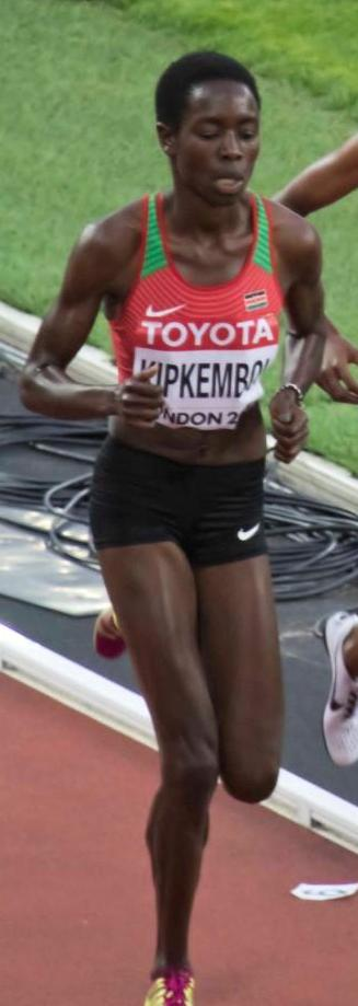 d9_7 finale 5000m hassan